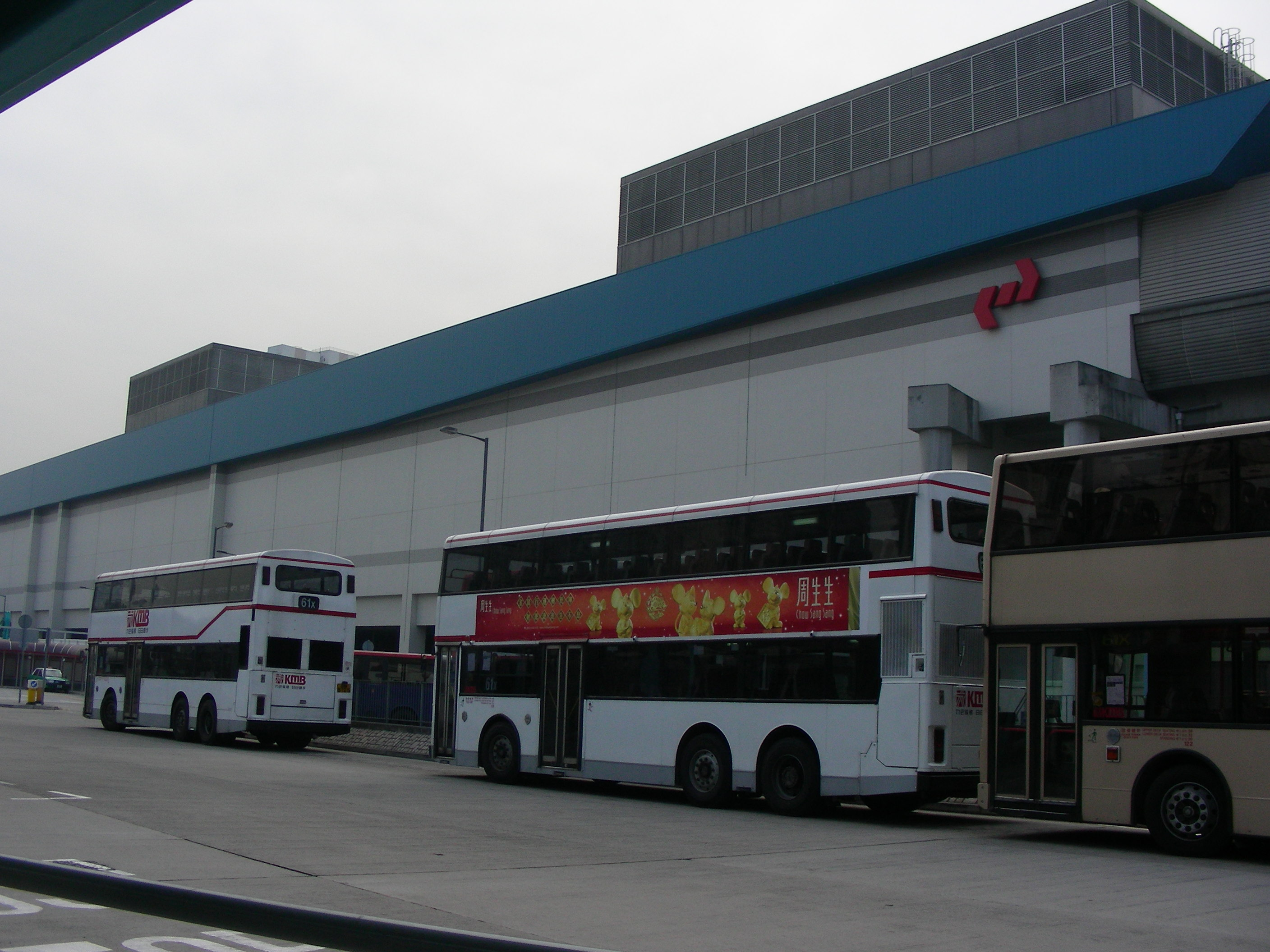 KCR West Rail Tuen Mum Station